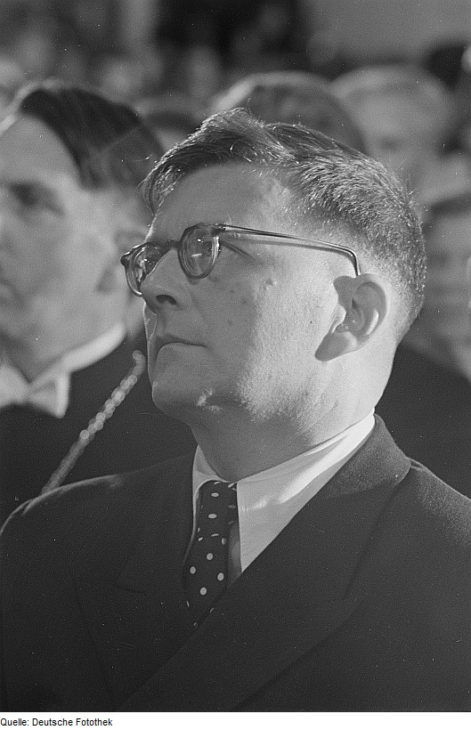 Original image description from the Deutsche Fotothek Portrait Dmitri Dmitrijewitsch Schostakowitchs im Publikum der Bachfeier